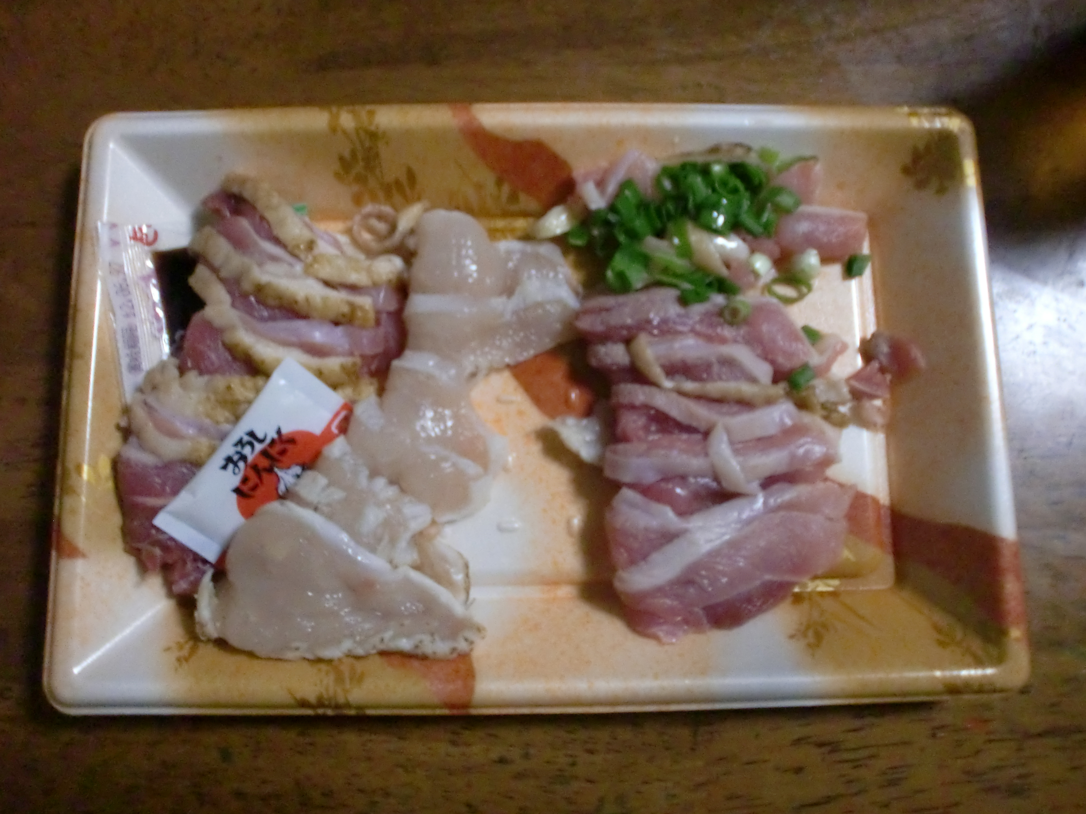 日本国鹿児島県のスーパーで一般的に販売されている鶏刺しの画像。